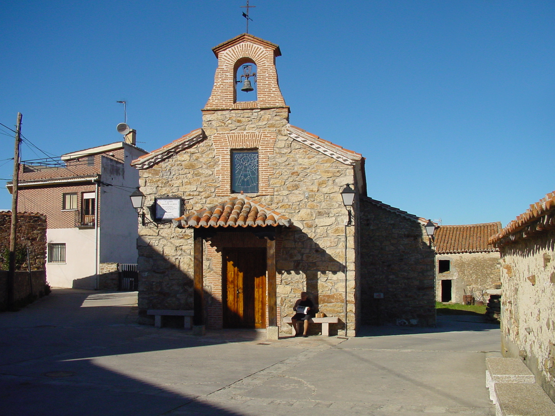 Vista de iglesia en Garganta de los Montes. Iglesia del Pilar en El Cuadrón.